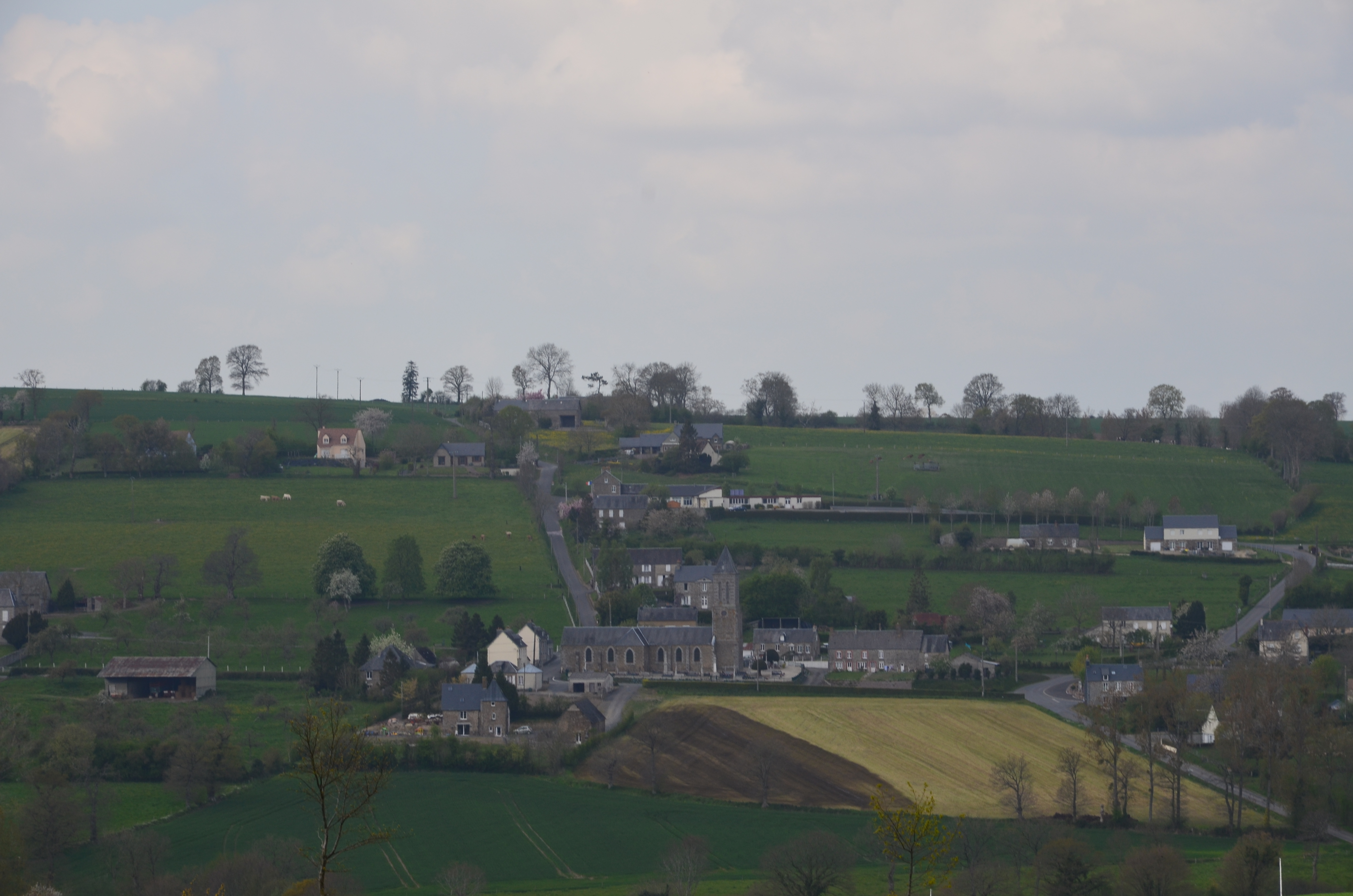 Vue sur le bourg de Presles depuis le lieu-dit Le Bas Perriers